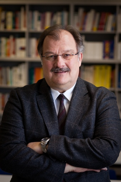 Portrait von Prof. Goehner erstellt am IAS